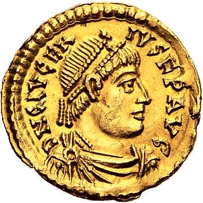 Glycerius, 473-474, Solidus (4,34g), Ravenna. D N GLVCER-IVS F P AVG, Büste mit Perlendiadem, Drapierung und Kürass nach rechts. RIC 3103 (R4), C 3 (350 Fr.), Lacam -.